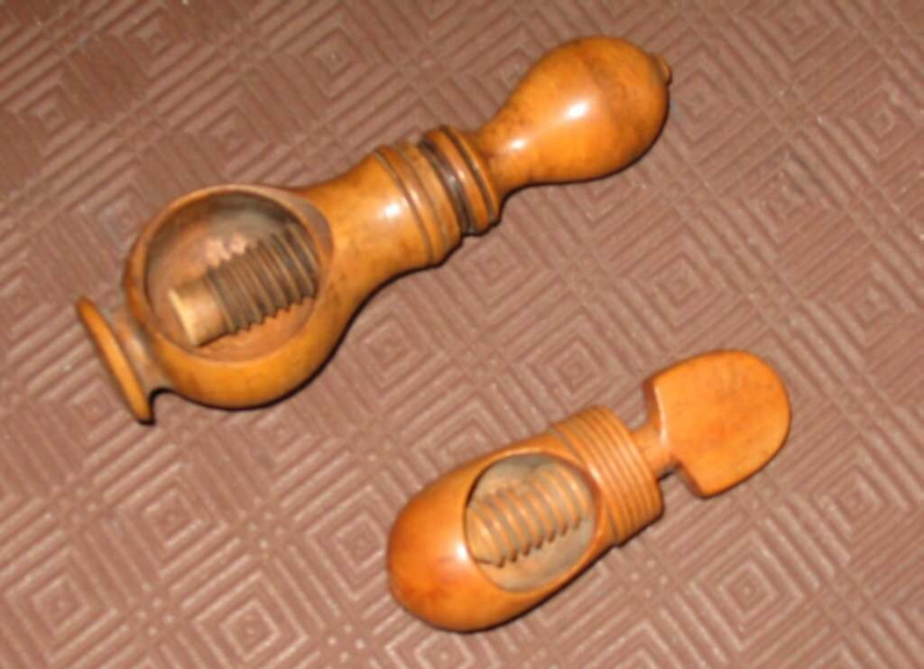 Casse-noisettes à vis (XIXe siècle) Photo JH Mora sept. 2004 Licence GFDL